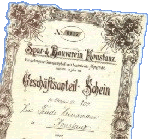 Geschaeftsanteil-Schein SBK